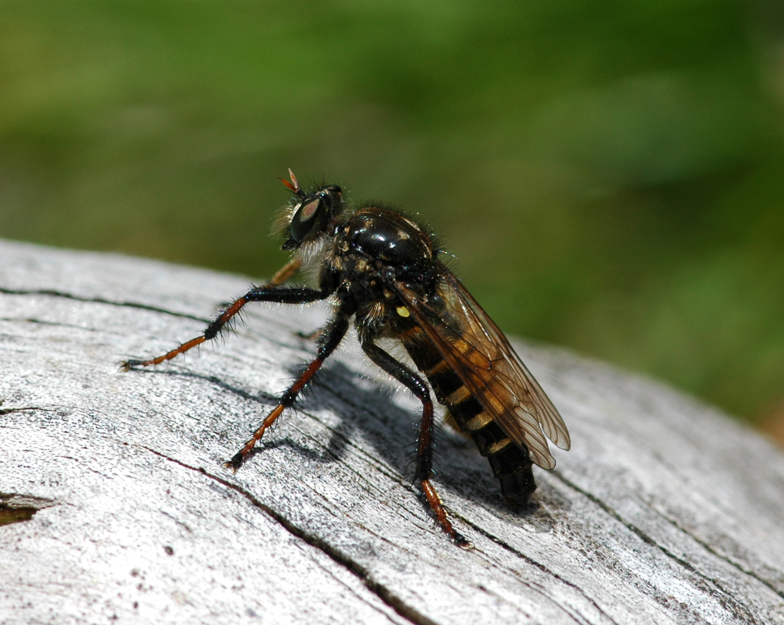 Cyrtopogon ruficornis female